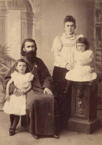 კალისტრატე ცინცაძე მეუღლესთან ერთად